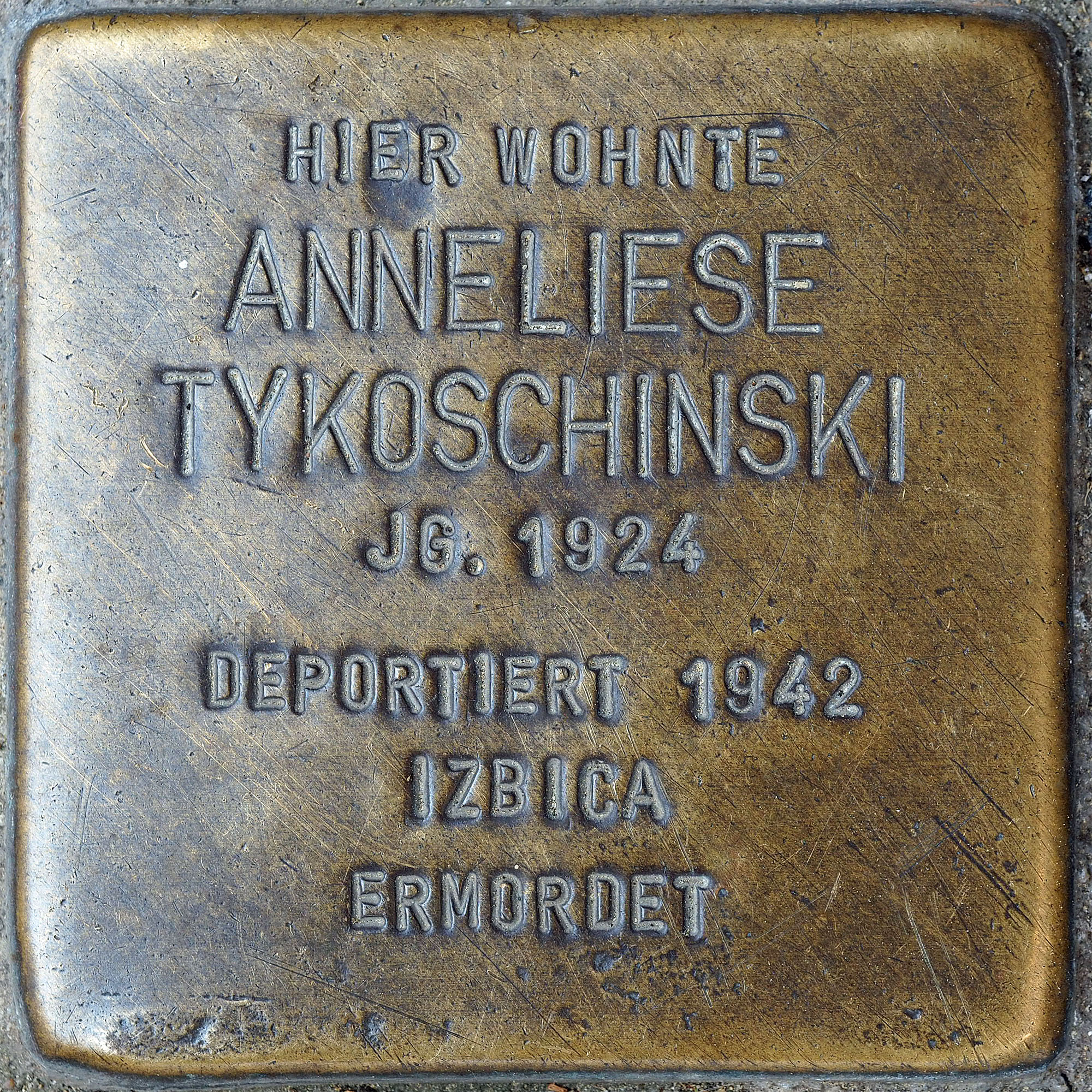 Stolpersteine MG: Tykoschinski, Anneliese